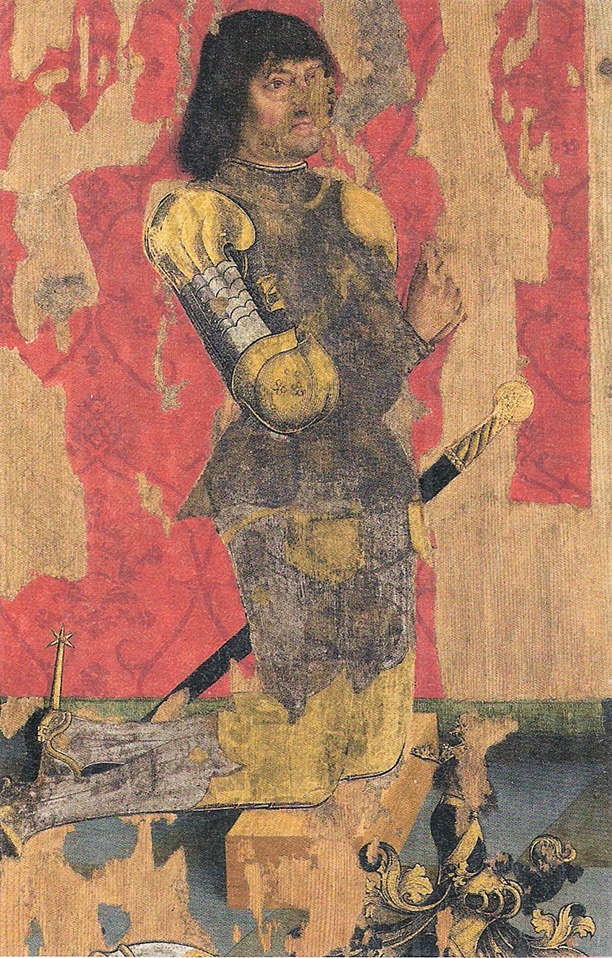 Georg von Ehingen, Tafelgemälde aus dem Altar der Schlosskapelle Kilchberg, heute in der Staatsgalerie Stuttgart